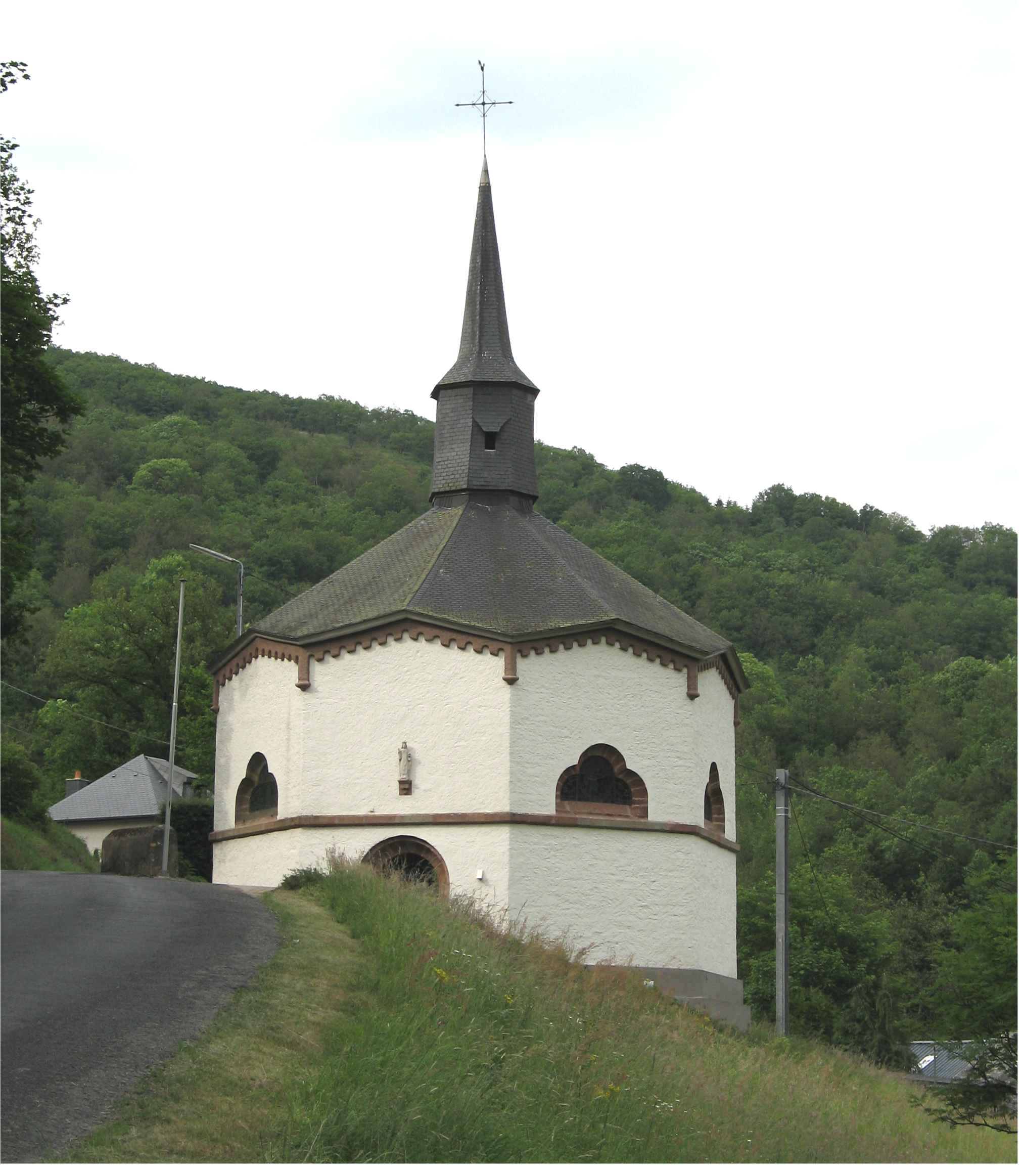 D'Kapell aus dem Heischtergronn. Heischtergronn Kapell Heischtergronn Kategorie:Gemeng Heischent Heischtergronn